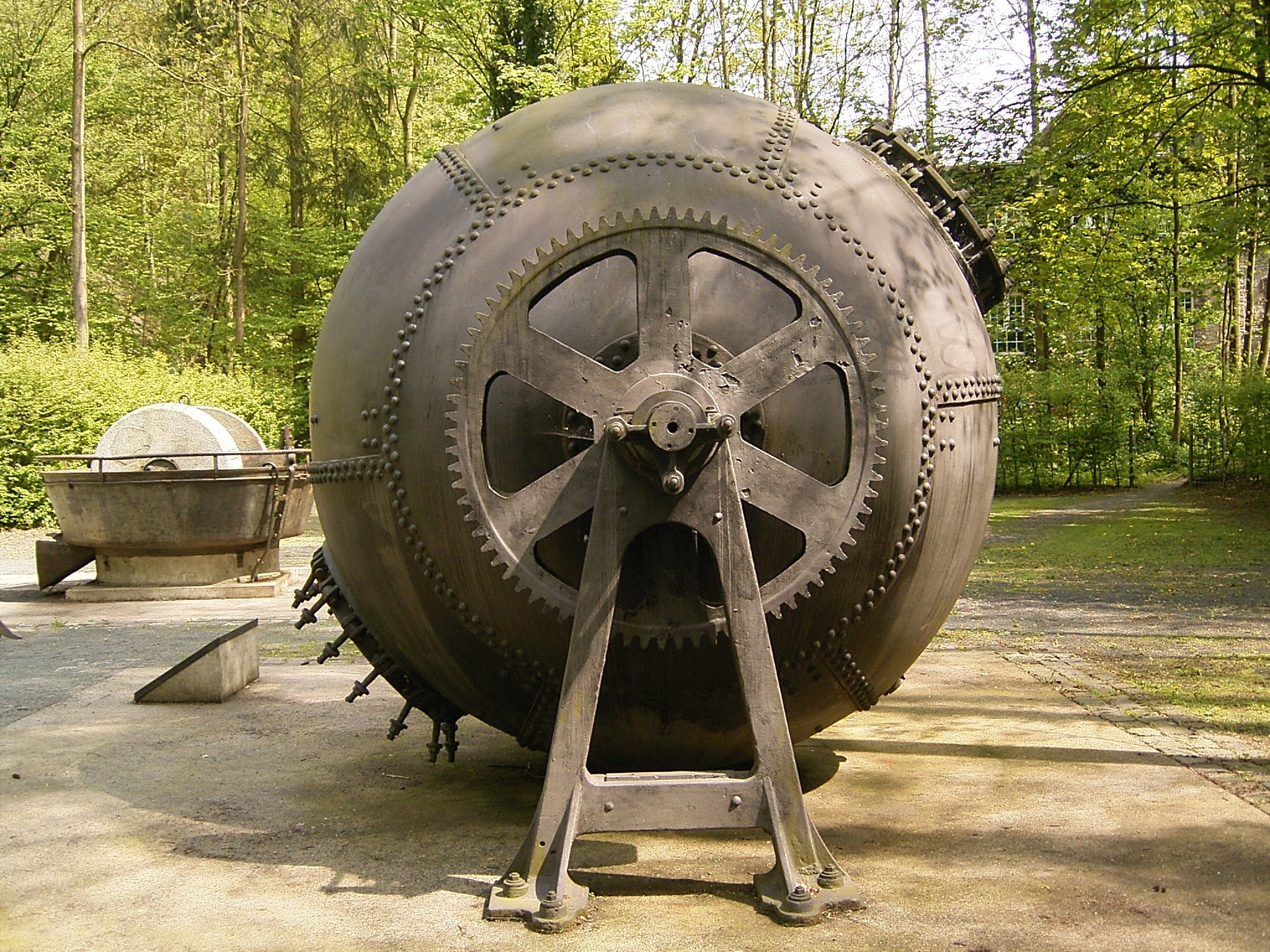 Papiermühle Alte Dombach in Bergisch Gladbach